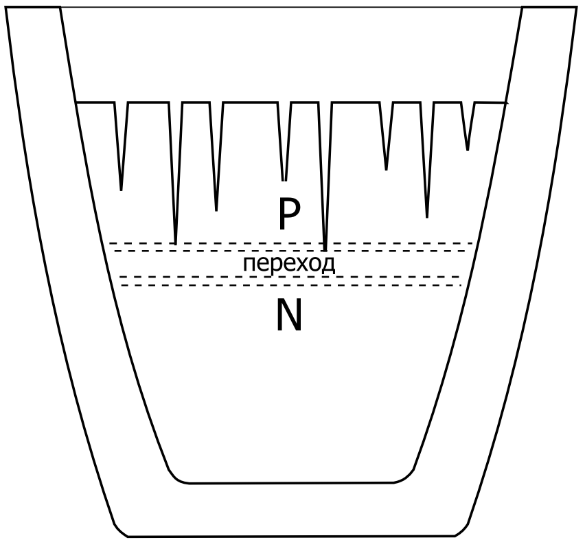 Плавка кремниевого pn-перехода по Олу (по патенту США 2402662, заявка 27.05.1941, рис. 1).